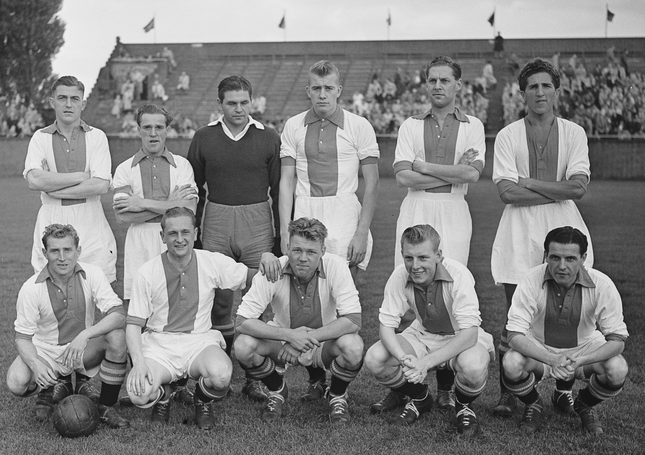 Ajax tegen DOS 3-2. Ajax-elftal.Staand vlnr: Jan Potharst, Frits van Brienen, Aad Visser, Henk Elzer, Jan Wolterink, Hans Boskamp; zittend vlnr: Eef Westers, Gé van Dijk, Rinus Michels, Arend van der Wel, Guus Dräger.